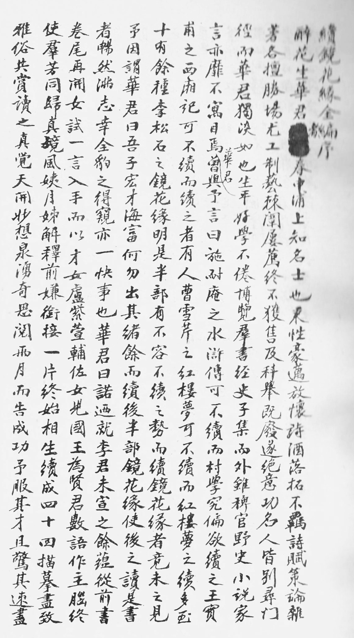 中文（中国大陆）: 《续镜花缘》作者自序